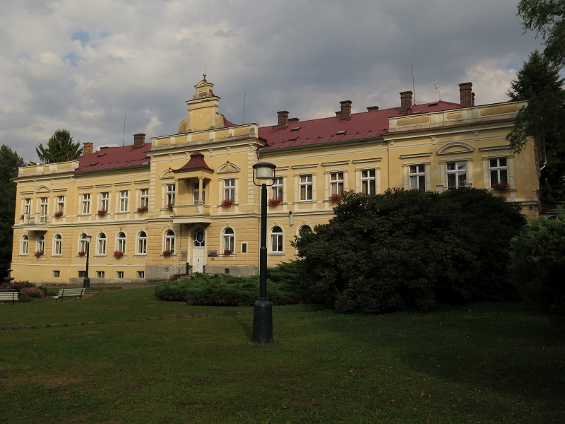 Zámek Letiny - nyní areál lázní, Lázně Letiny 70, Lázně Letiny.